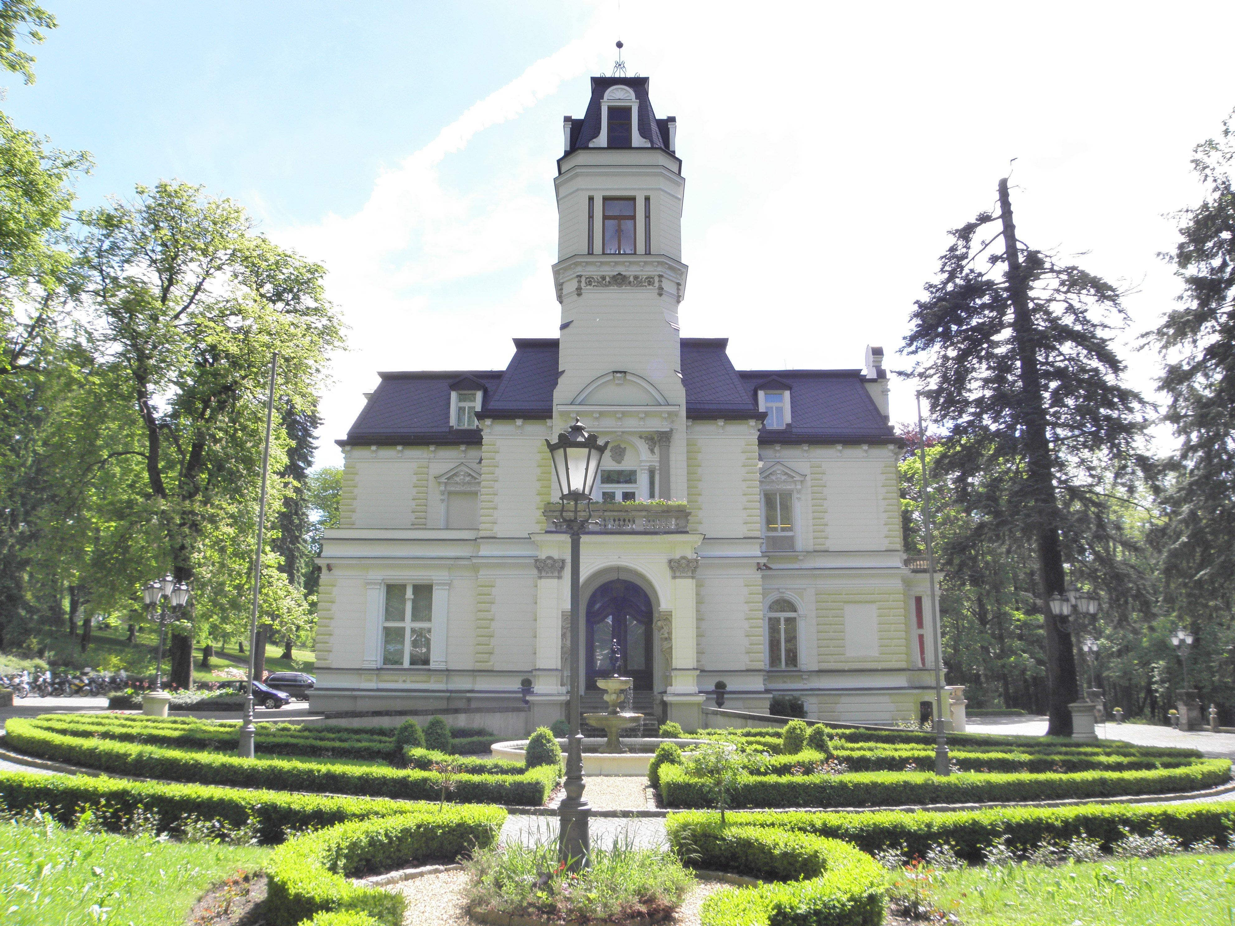 Westansicht der Villa Klinger nach den Renovierungsarbeiten, 2010